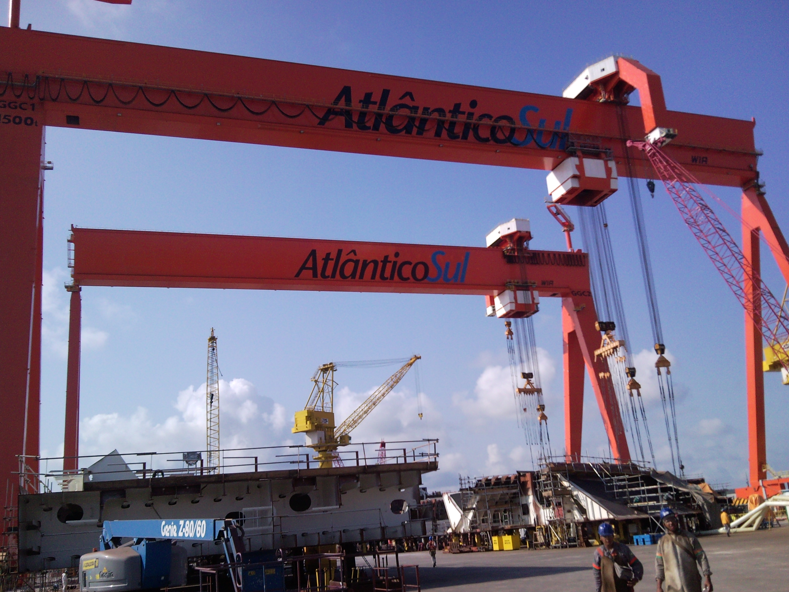 Estaleiro Atlântico Sul - PE